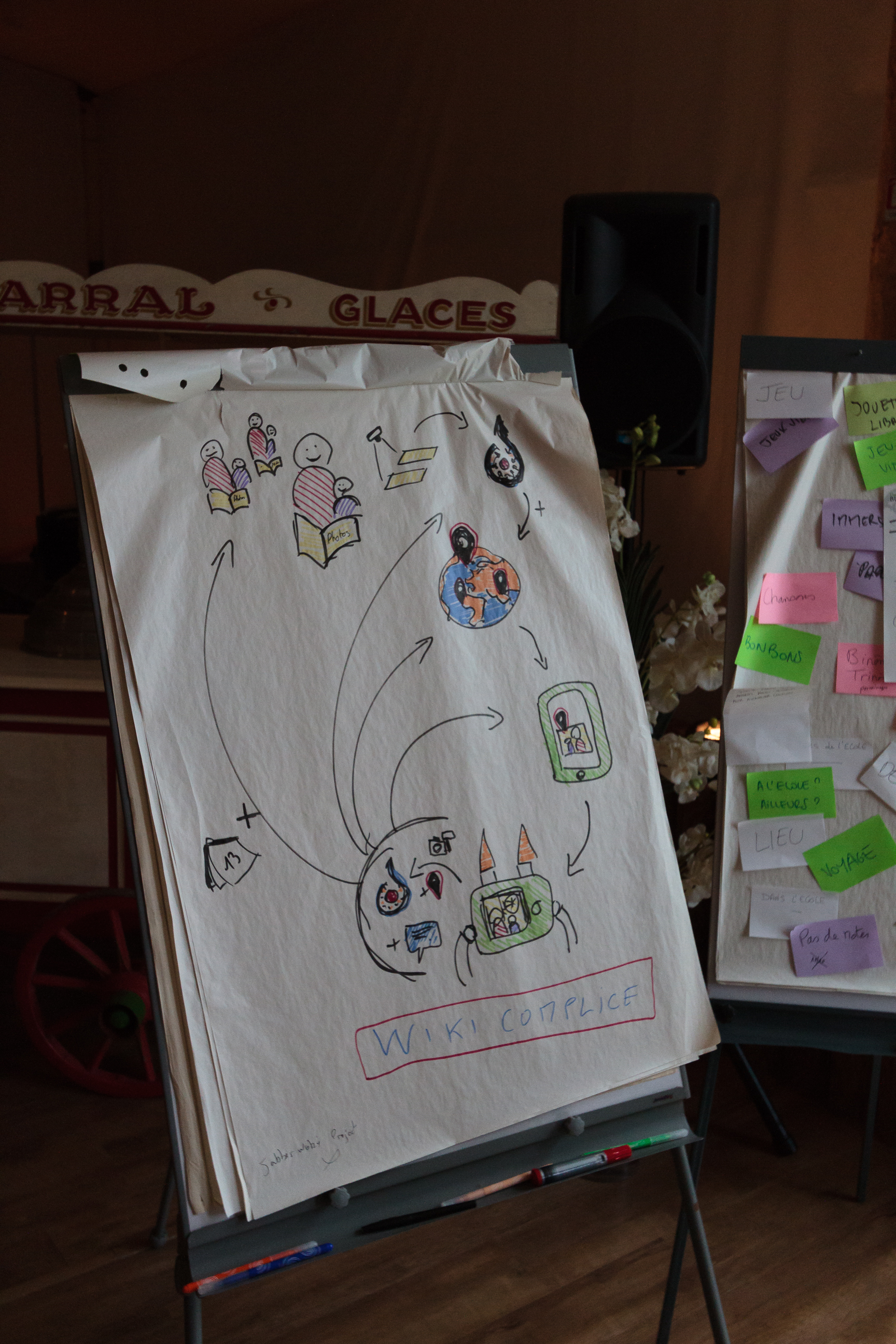 Week-end stratégie 2015 de Wikimedia France Wikimedia France Strategy Meeting 2015